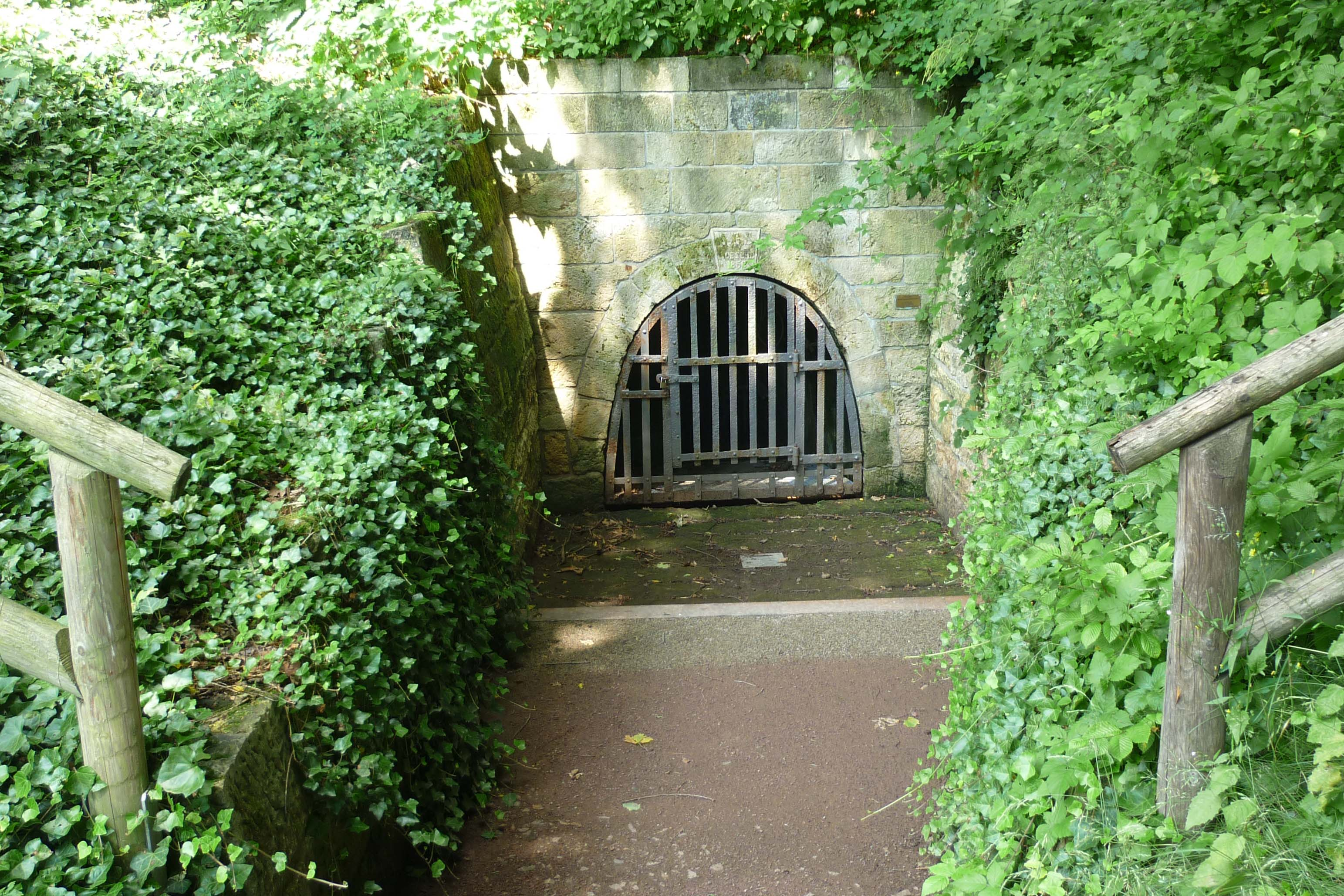 Mundloch vom Segen-Gottes-Schacht, Poisentalstraße in Freital-Niederhäslich